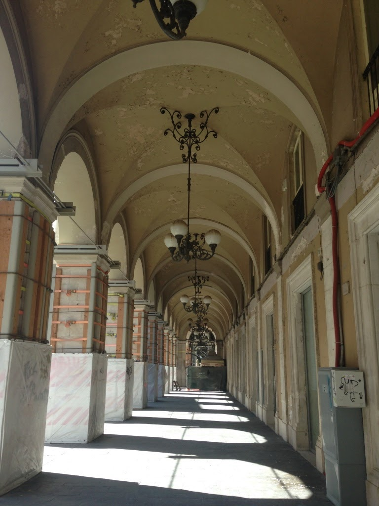 Portici della Camera di Commercio